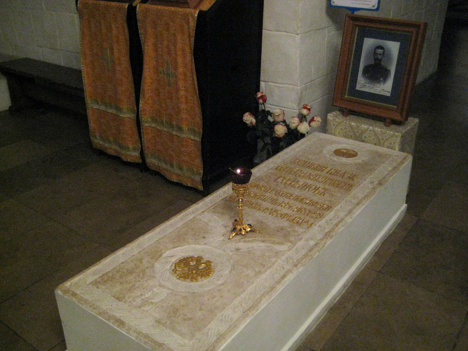 Новоспасский монастырь. Усыпальница Романовых